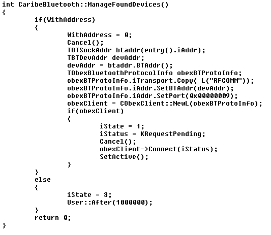 הקוד של תולעת קרבי